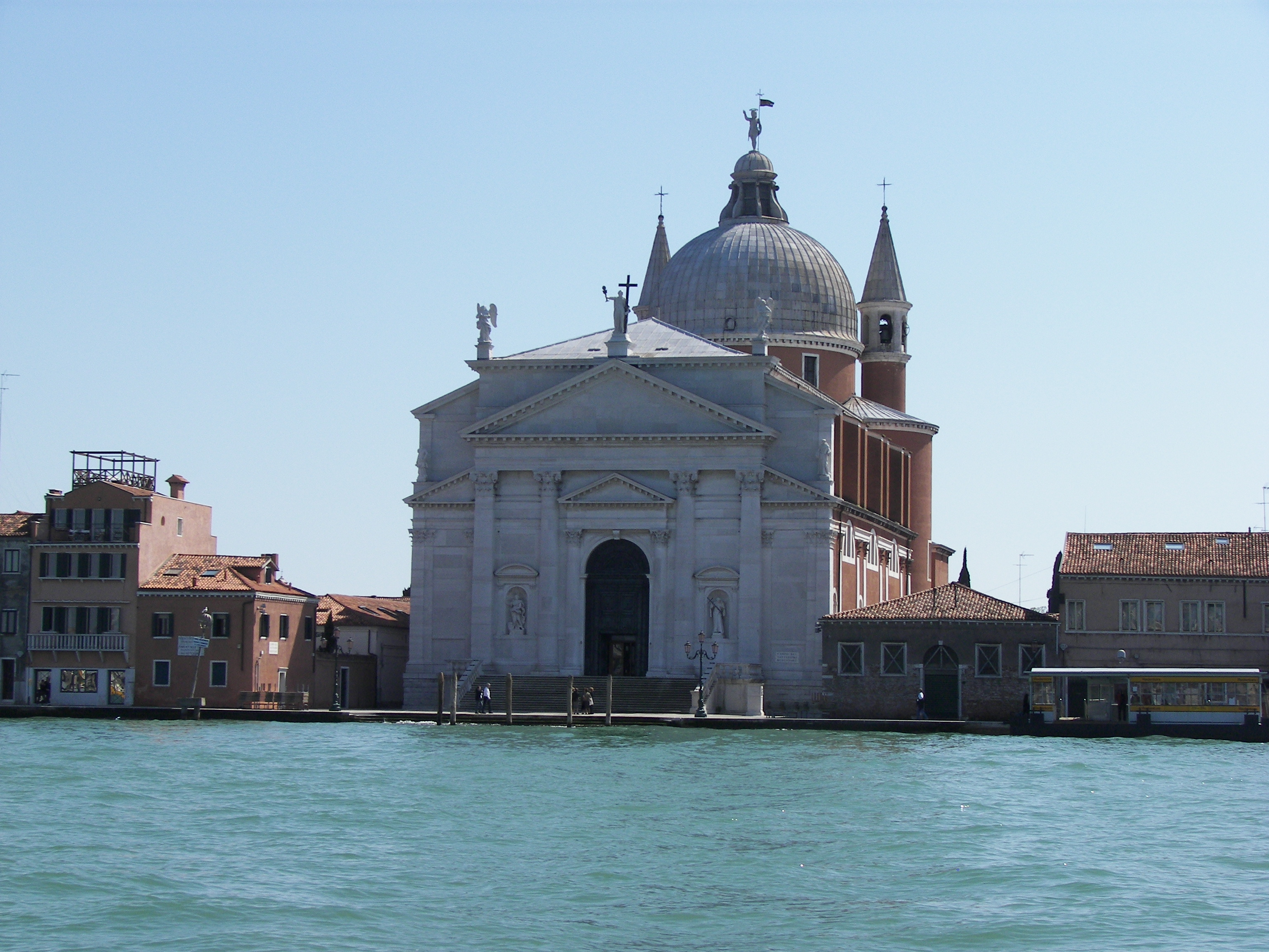 Chiesa del Redentore in Venezia.